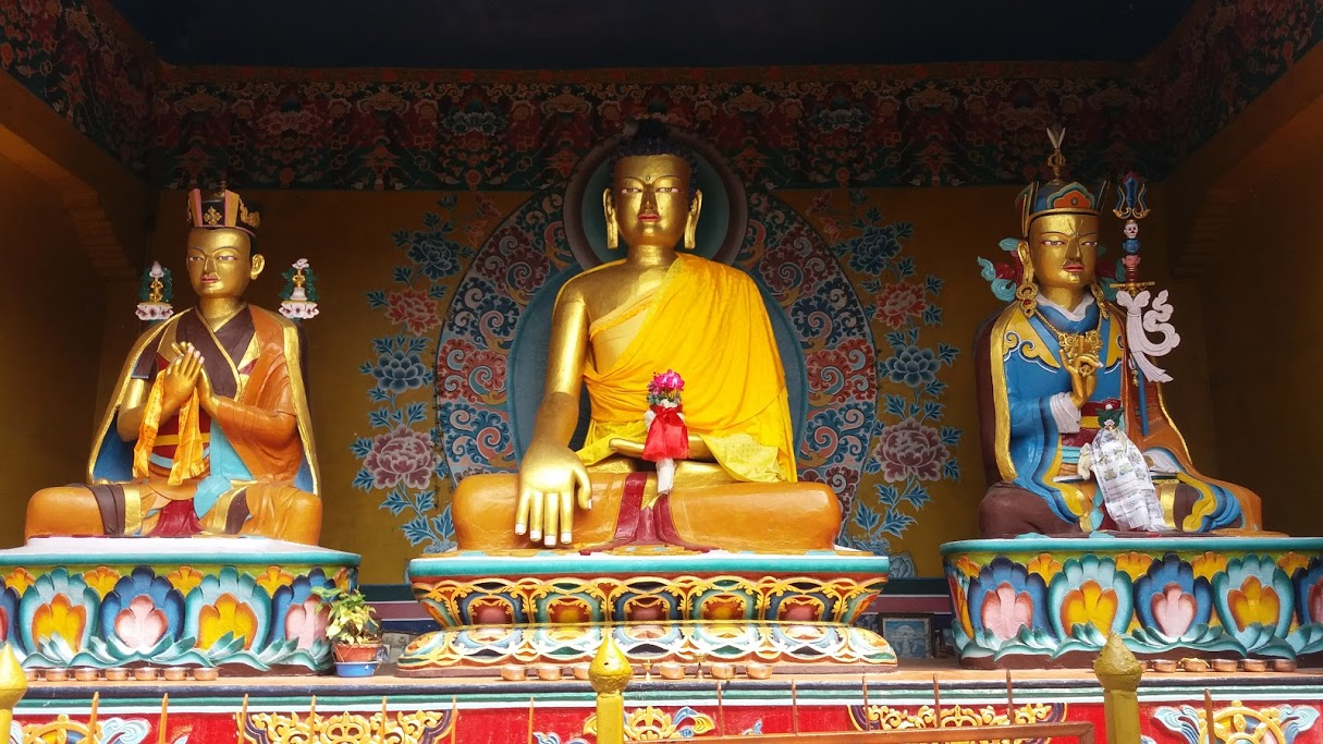 नेपाली: पोखराको मुस्ताङ गुम्बाको परिसरमा रहेको बुद्धको प्रतिमा